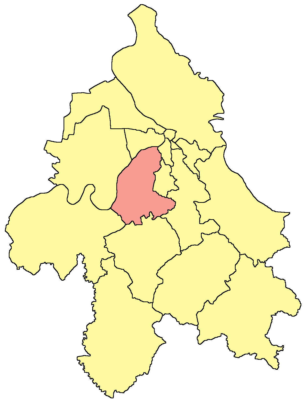 Belgrade municipality map